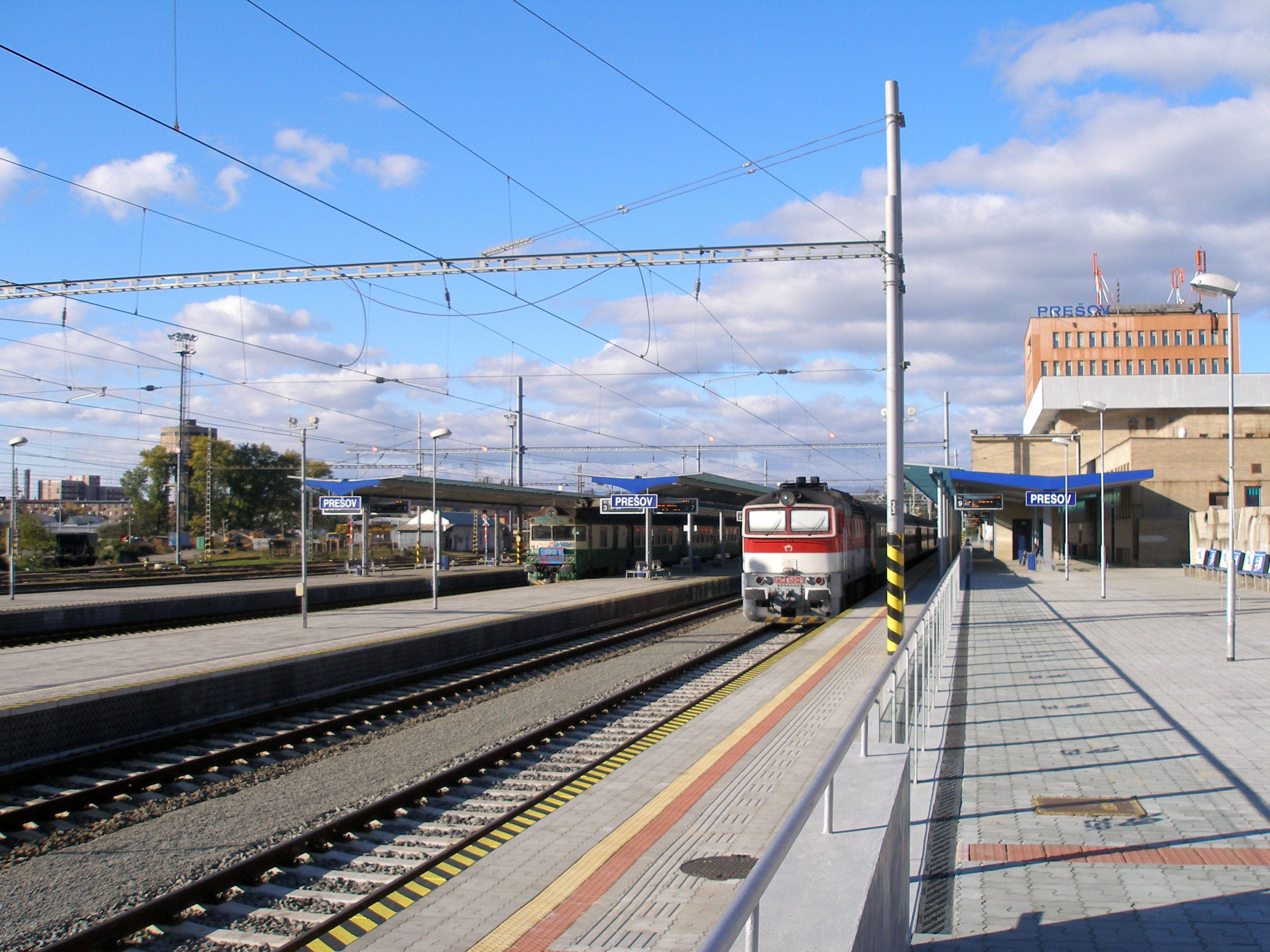 Železničná stanica v krajskom meste Prešov, región Šariš